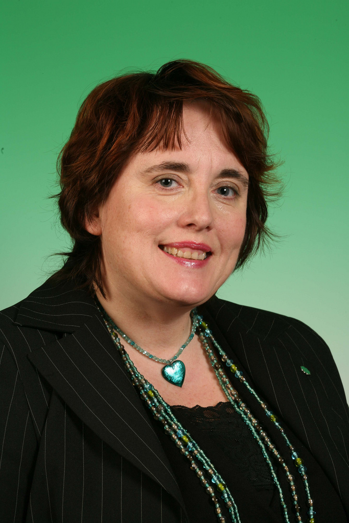 17Nordland, Janne Sjelmo Nord�s